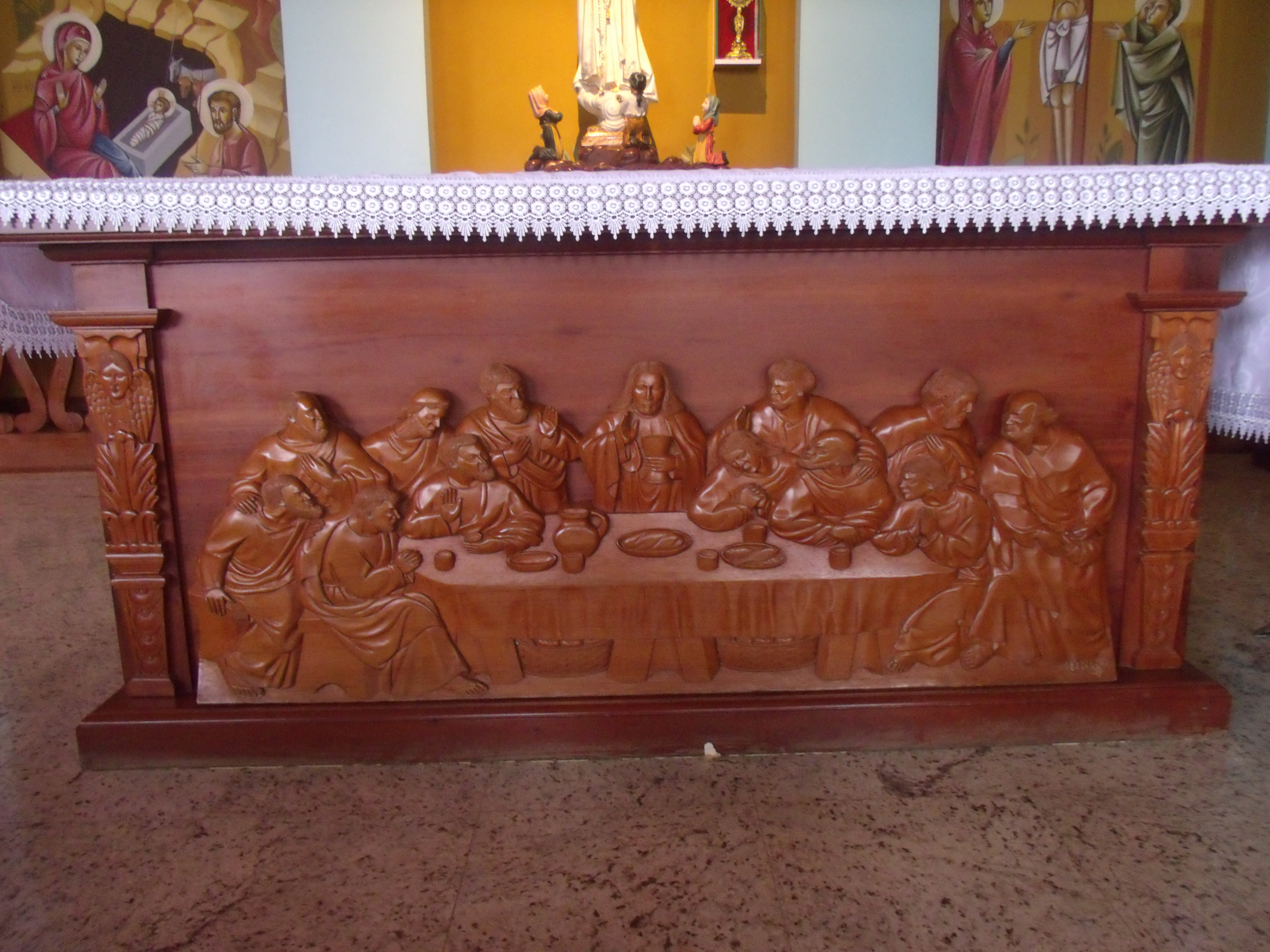 Santa Ceia em arte de entalhe em madeira no Santuário de N S de Fátima da Serra Grande.